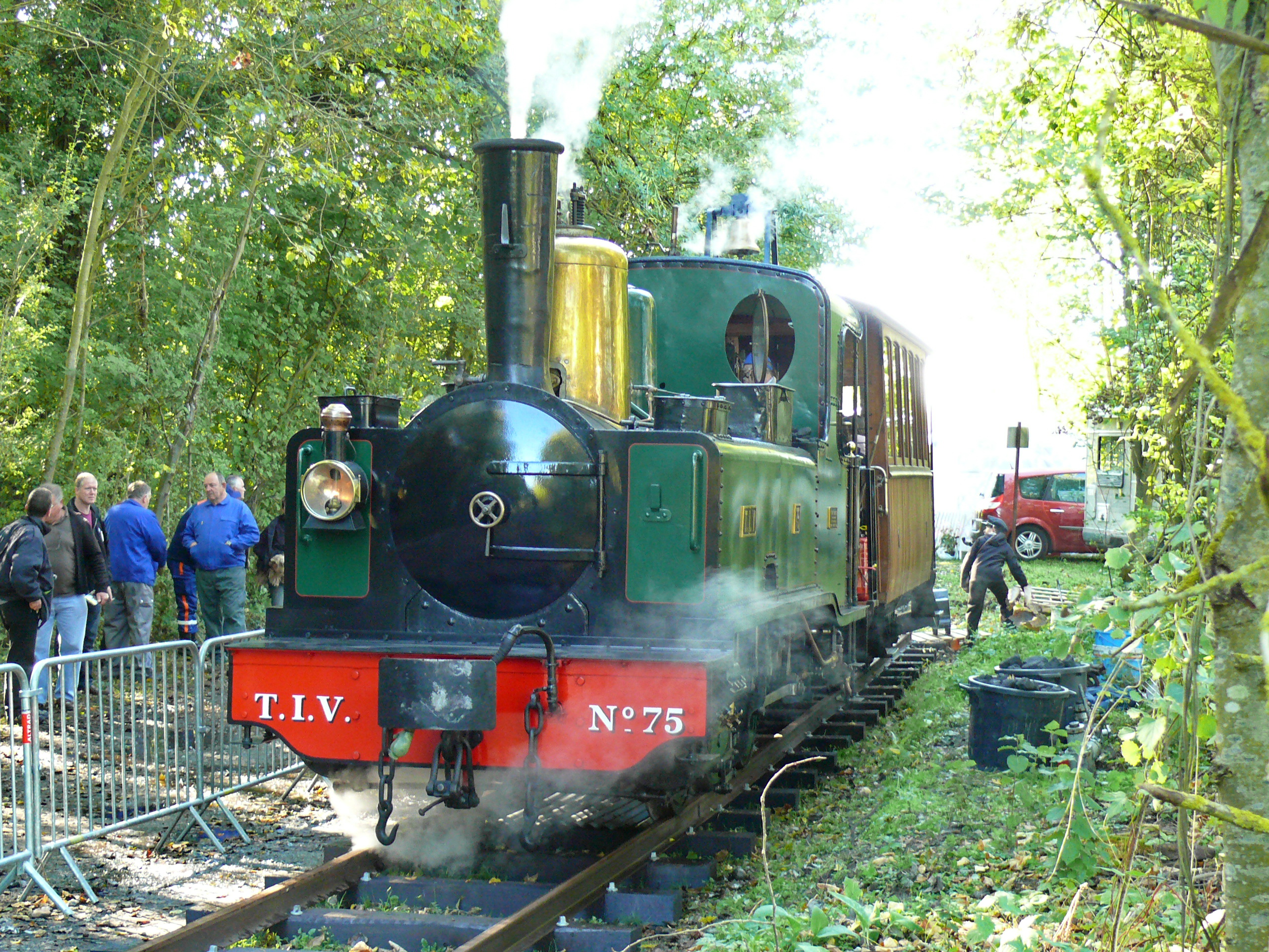 Locomotive Vve Corpet-Louvet et Cie n° 1234 de 1909, ex TIV n°75 du MTVS, sortant tout juste de restauration, sur une voie provisoire édifiée sur l'emprise de l'ancienne ligne de chemin de fer Beauvais-Amiens à Saint-Omer-en-Chaussée